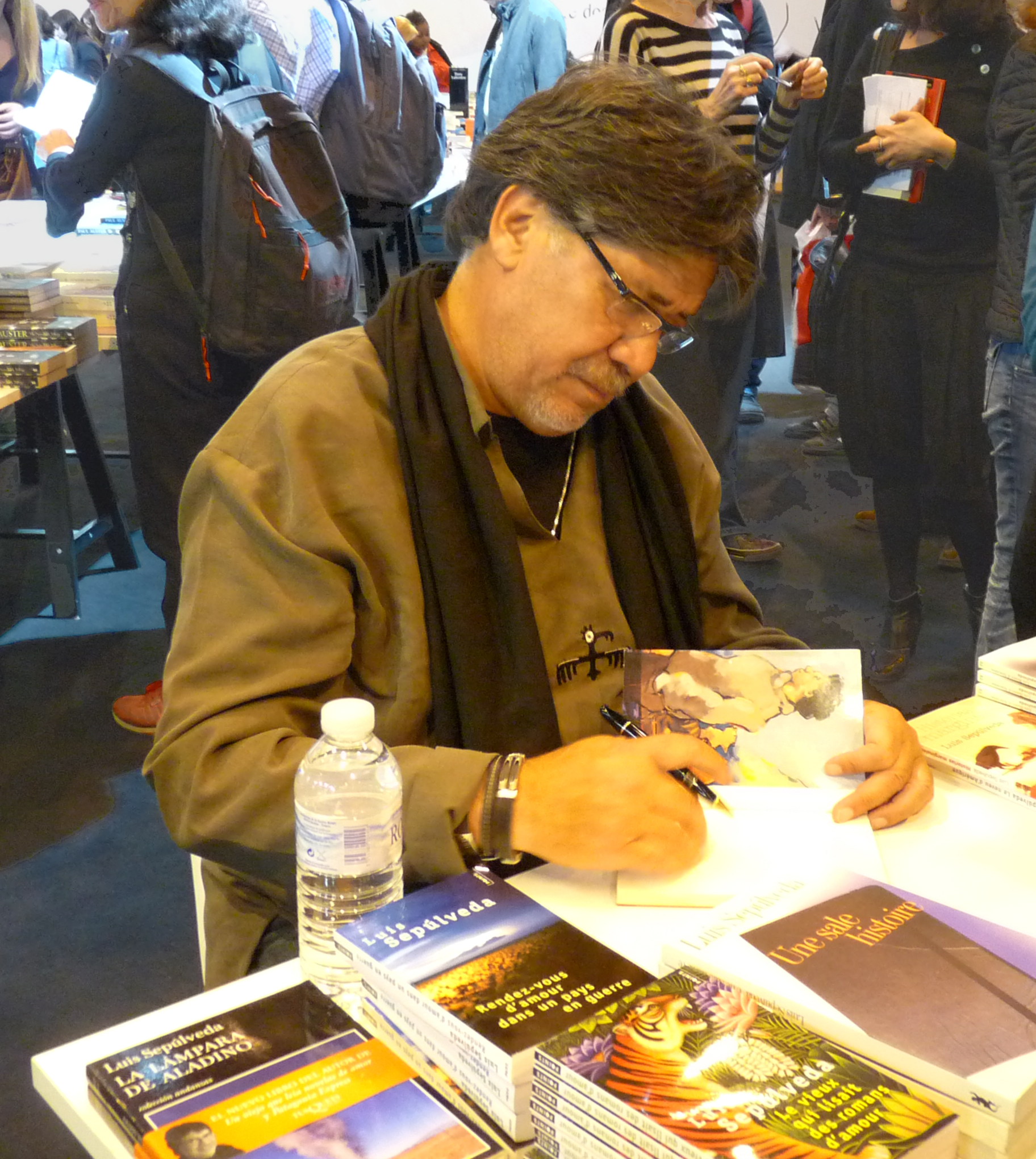 Luis Sepulveda au Salon du Livre de Paris